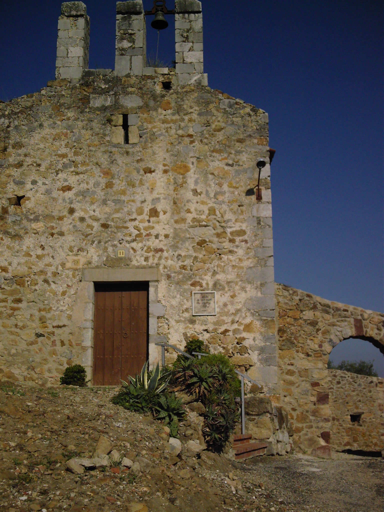 église st Marti Masarac